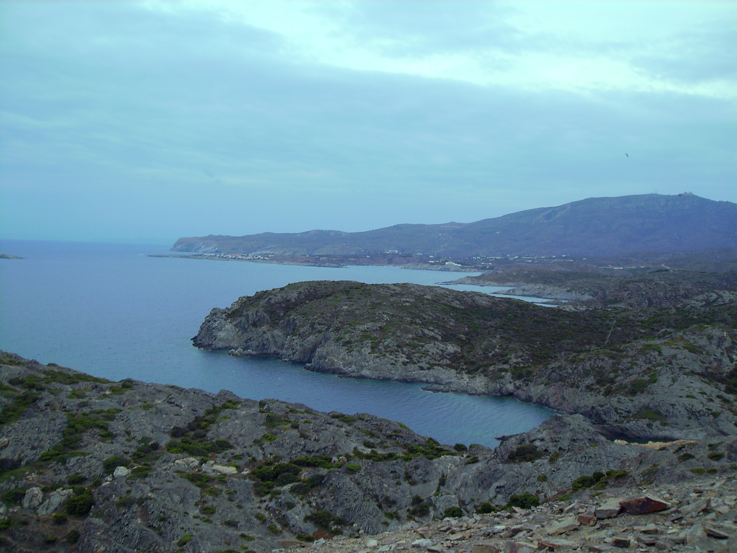 Cap de Creus, Alt Empordà, Catalunya